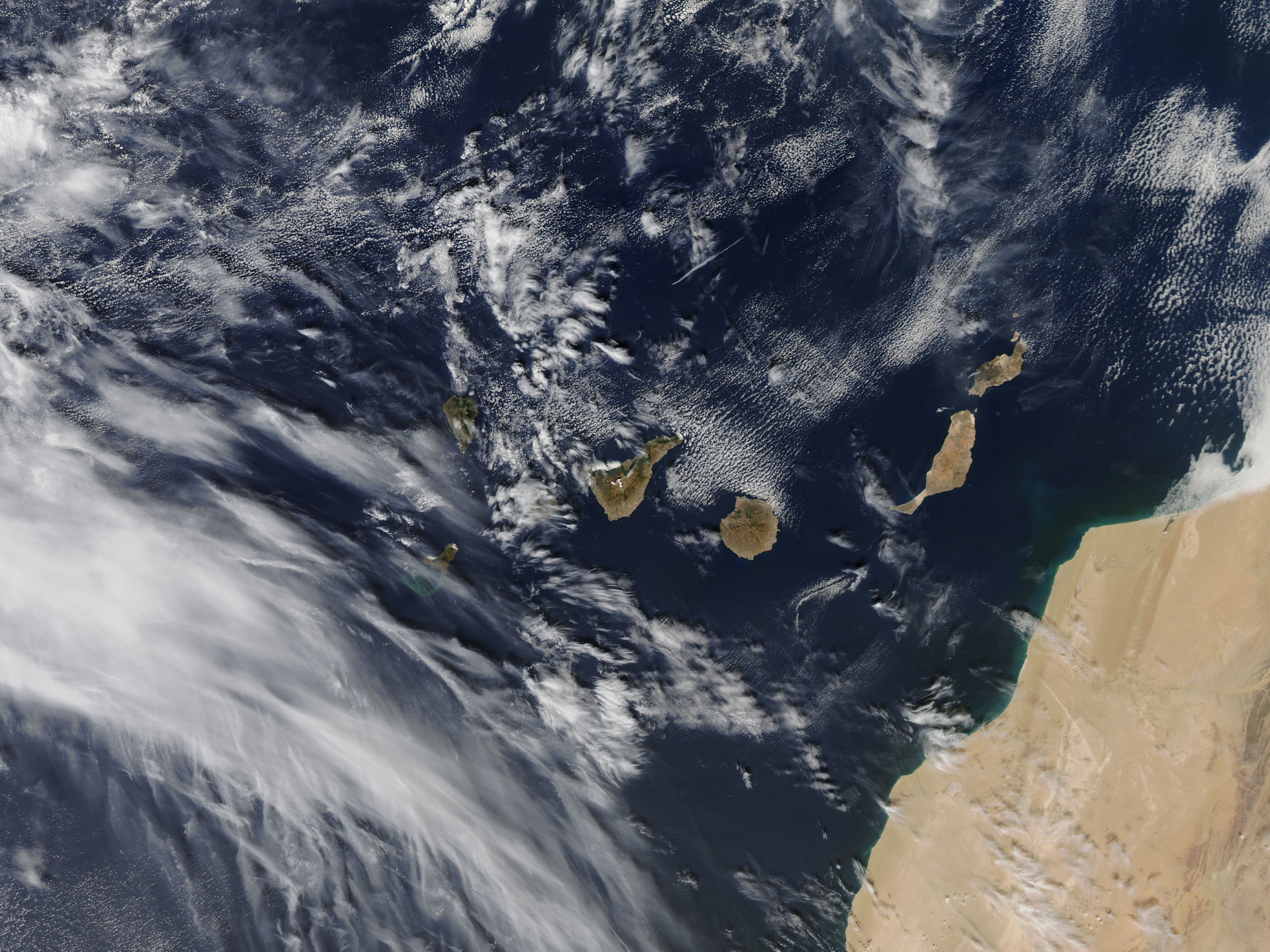 Imagen de satélite de las Islas Canarias tomada por el MODIS de la NASA el 15 de octubre de 2011, donde se aprecia el tamaño de la mancha provocada por la erupción frente a las costas de El Hierro, España.